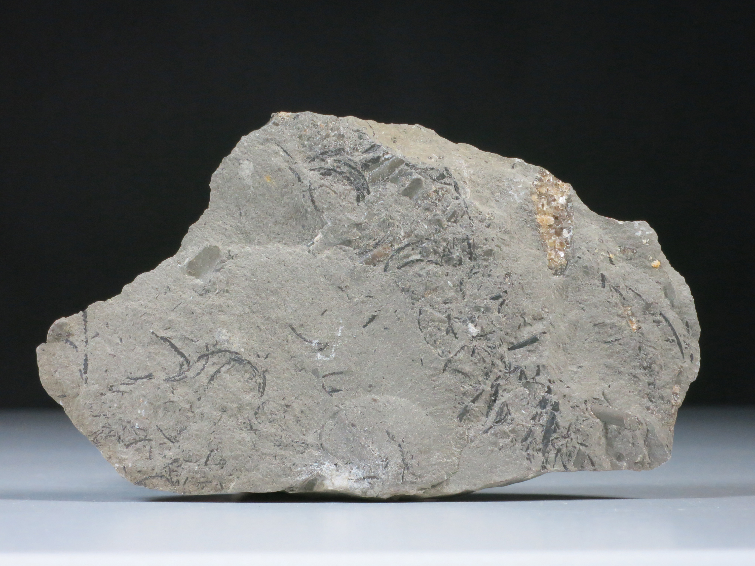 Grünlichgrauer Graptolithenmergel; Herkunft: Ostsee; Alter: Silur Fundort: Kiesgrube in Brandenburg